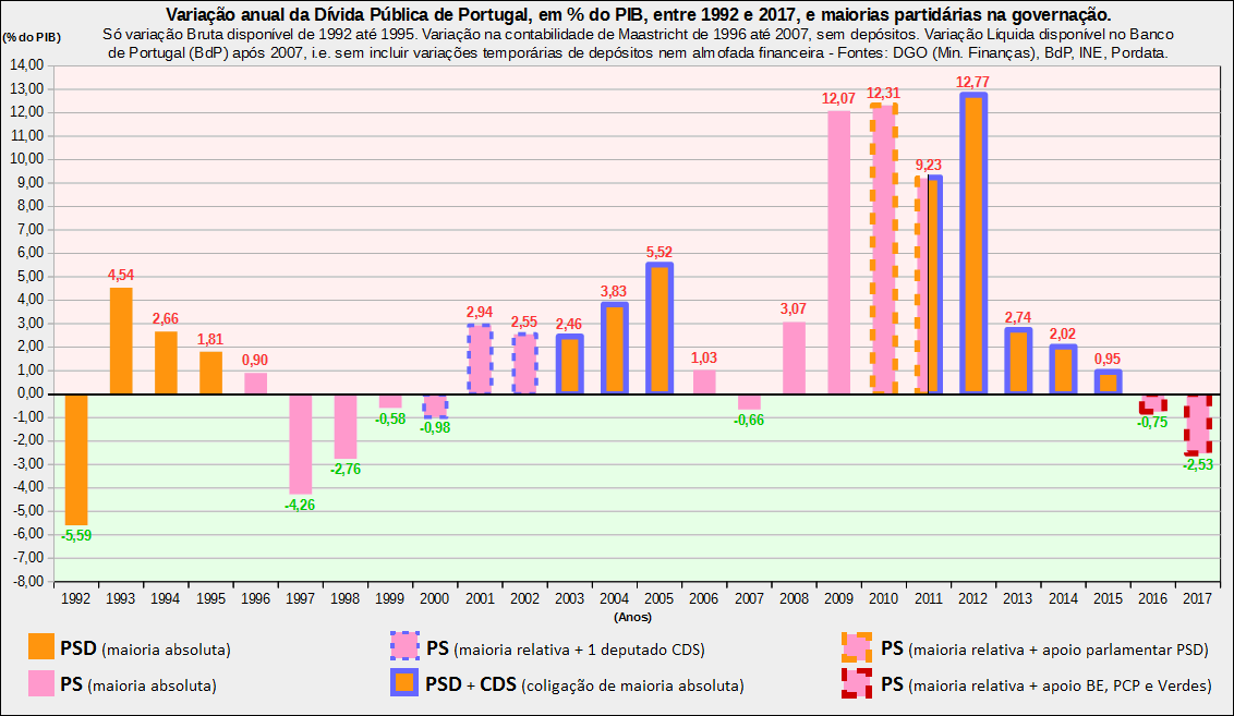 Variação anual da Divida Publica de Portugal, em percentagem do PIB, entre 1992 e 2017, e maiorias partidárias na governação. Desde que os dados existem, a variação usada é a da dívida líquida, pois removendo as subidas e descidas dos depósitos (ex: almofada financeira) mostra-se melhor o endividamento de facto.